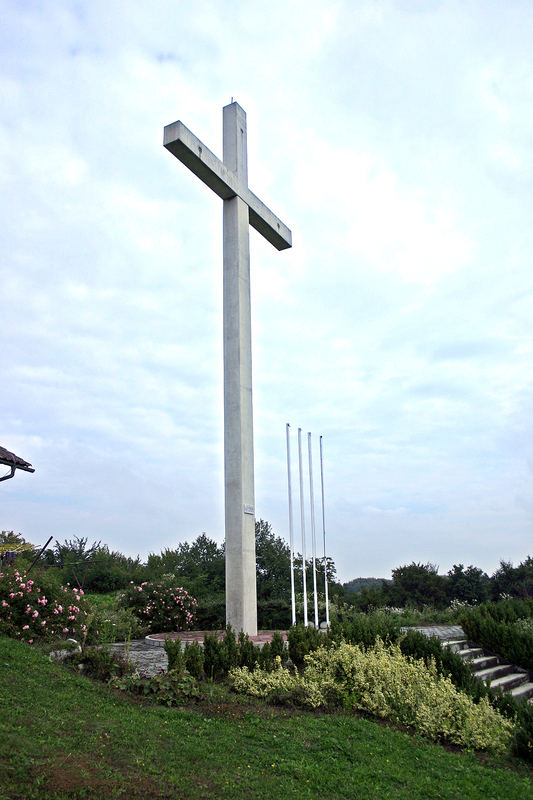 Evharistični križ, Trdkova Eucharistic cross, Trdkova Eucharistisches Kreuz, Trdkova